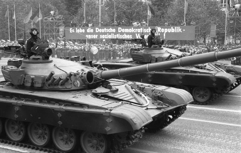 Berlin, 39. Jahrestag DDR-Gründung, Parade ADN-ZB / Mittelstädt / 7.10.kb / Berlin; Jahrtestag - Ehrenparade Mit einer Ehrenparade der NVA in der Karl-Marx-Allee wurden die Feierlichkeiten zum 39. Jahrestag der Gründung der DDR eingeleitet. Zu sehen waren u.a. Panzersoldaten aus der Division "Heinz Hoffmann" mit ihren modernen T-72.